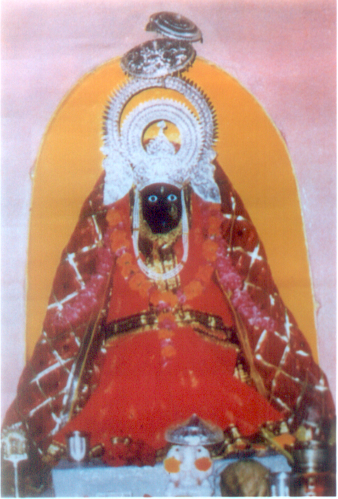 शिवरीनारायण के अन्नपूर्णा मंदिर में विराजित माँ अन्नपूर्णा